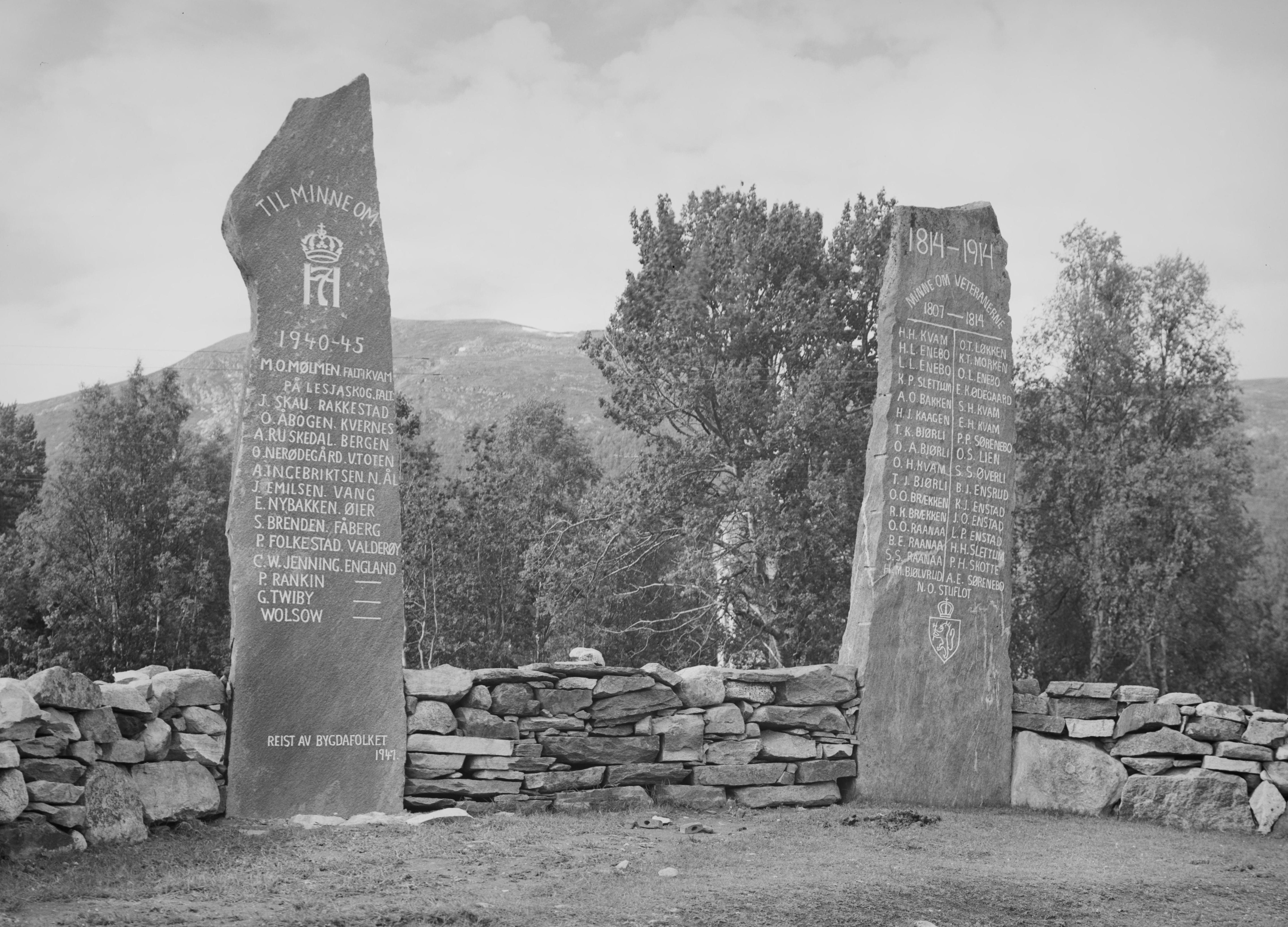 Bildet er hentet fra Nasjonalbibliotekets bildesamling. Anmerkninger til bildet var: Fotograf :Ukjent Lesjaskog, Lesja, Oppland